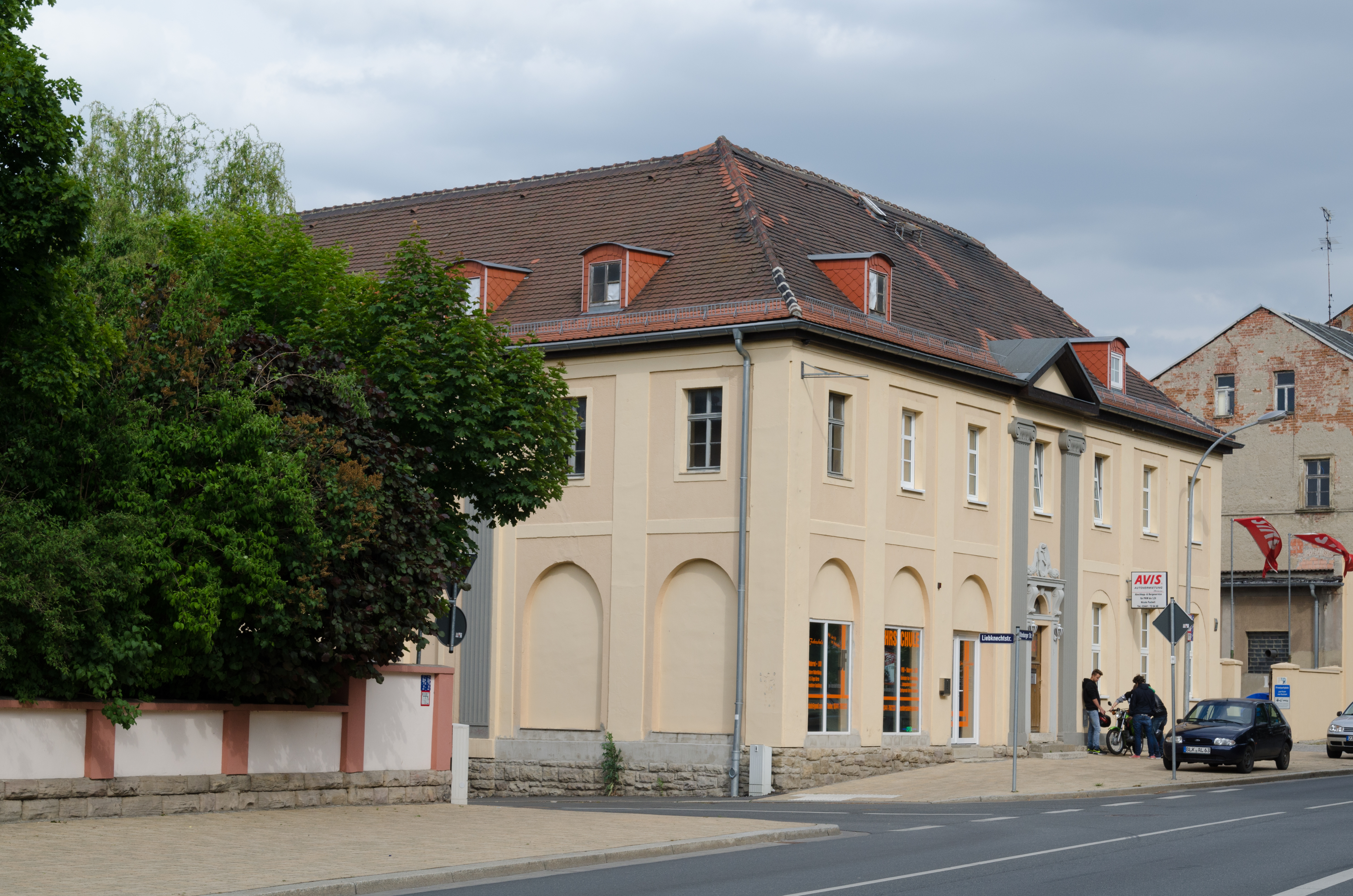 Zeitz, Altenburger Straße 51 und 52